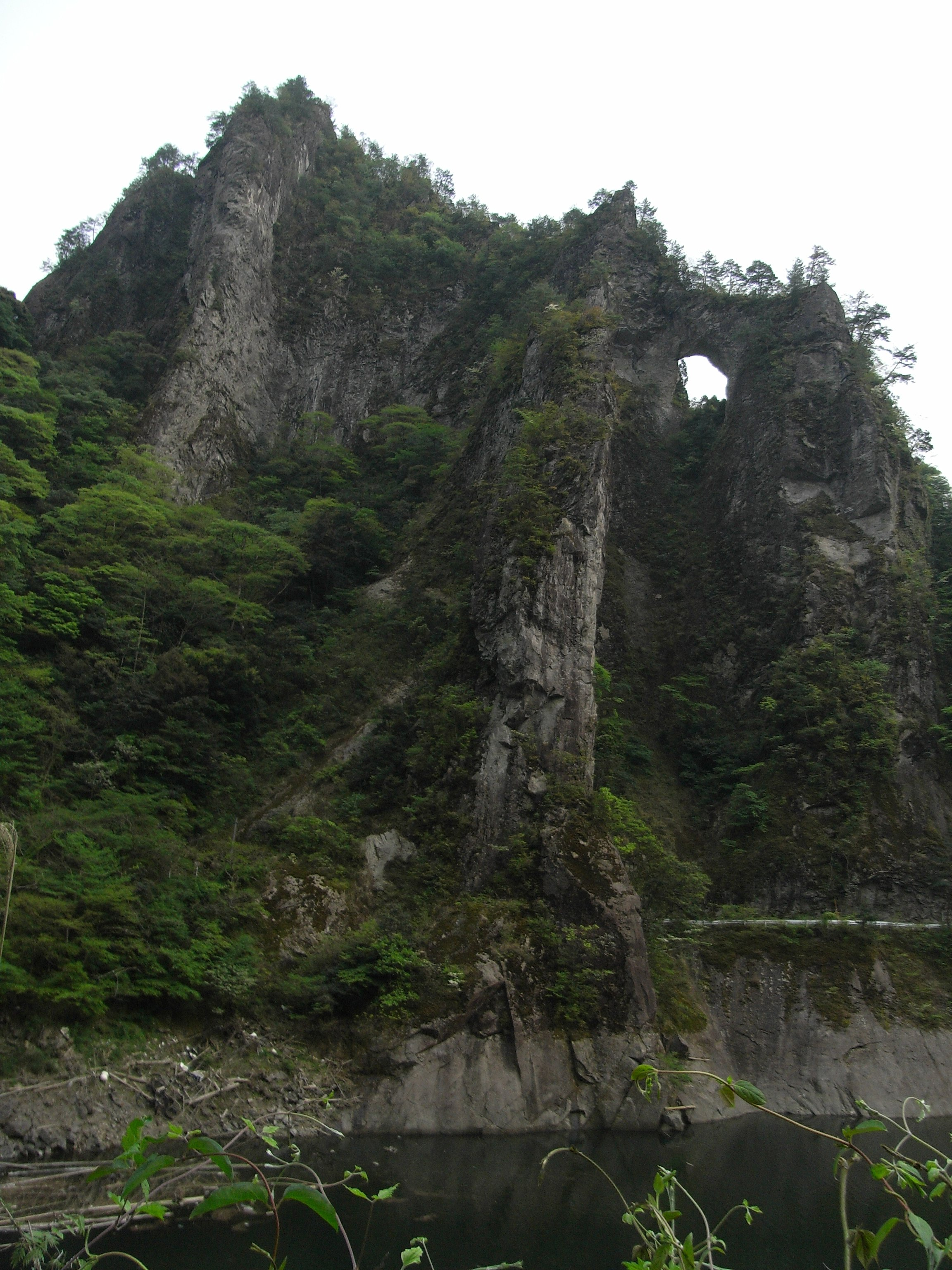 Gorge